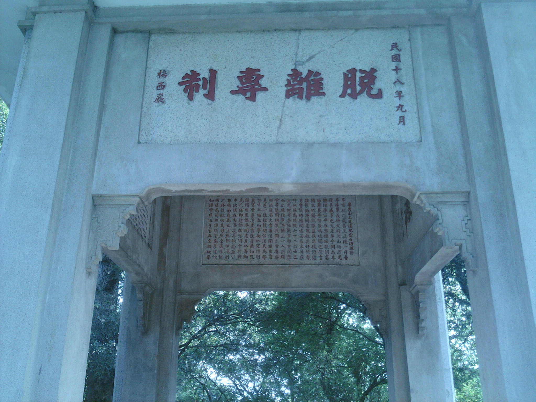 民國十八年九月 脱離專制 楊西巖